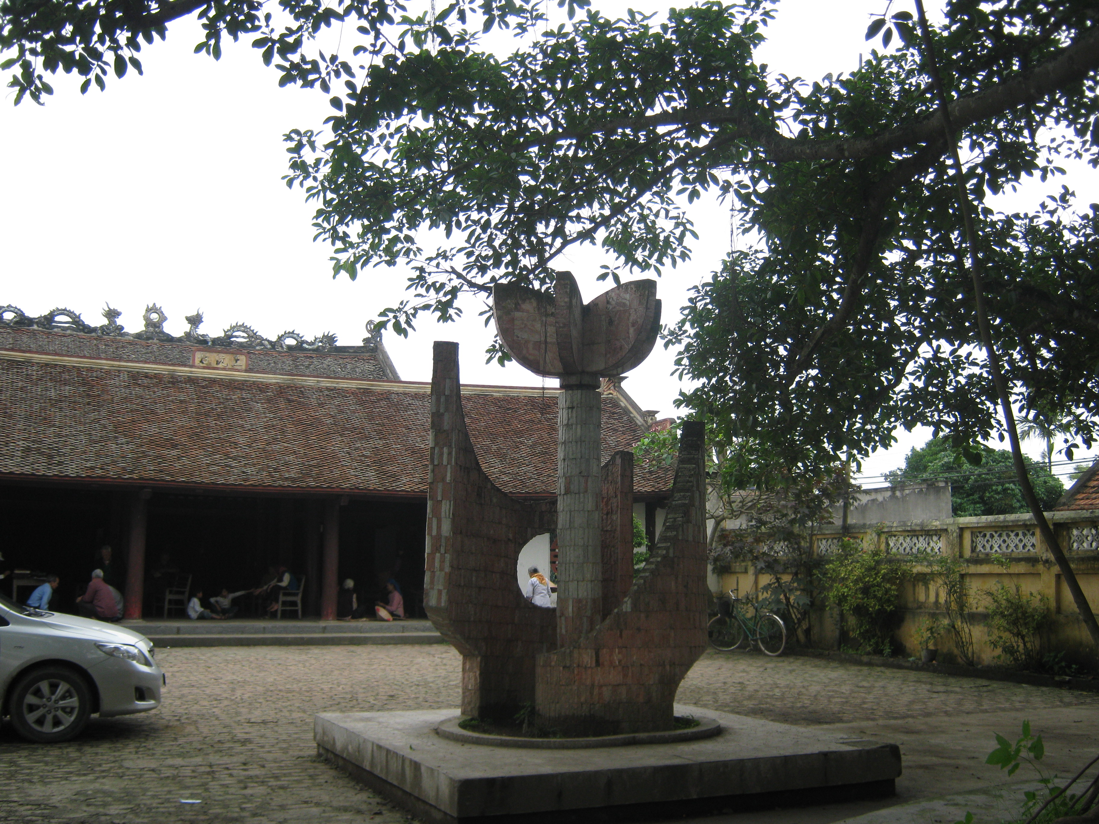 Quần thể di tích đền thờ vua Đinh Tiên Hoàng ở Nam Định